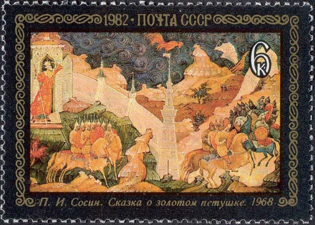 Марка_П.И. Сосин_Сказка о золотом петушке